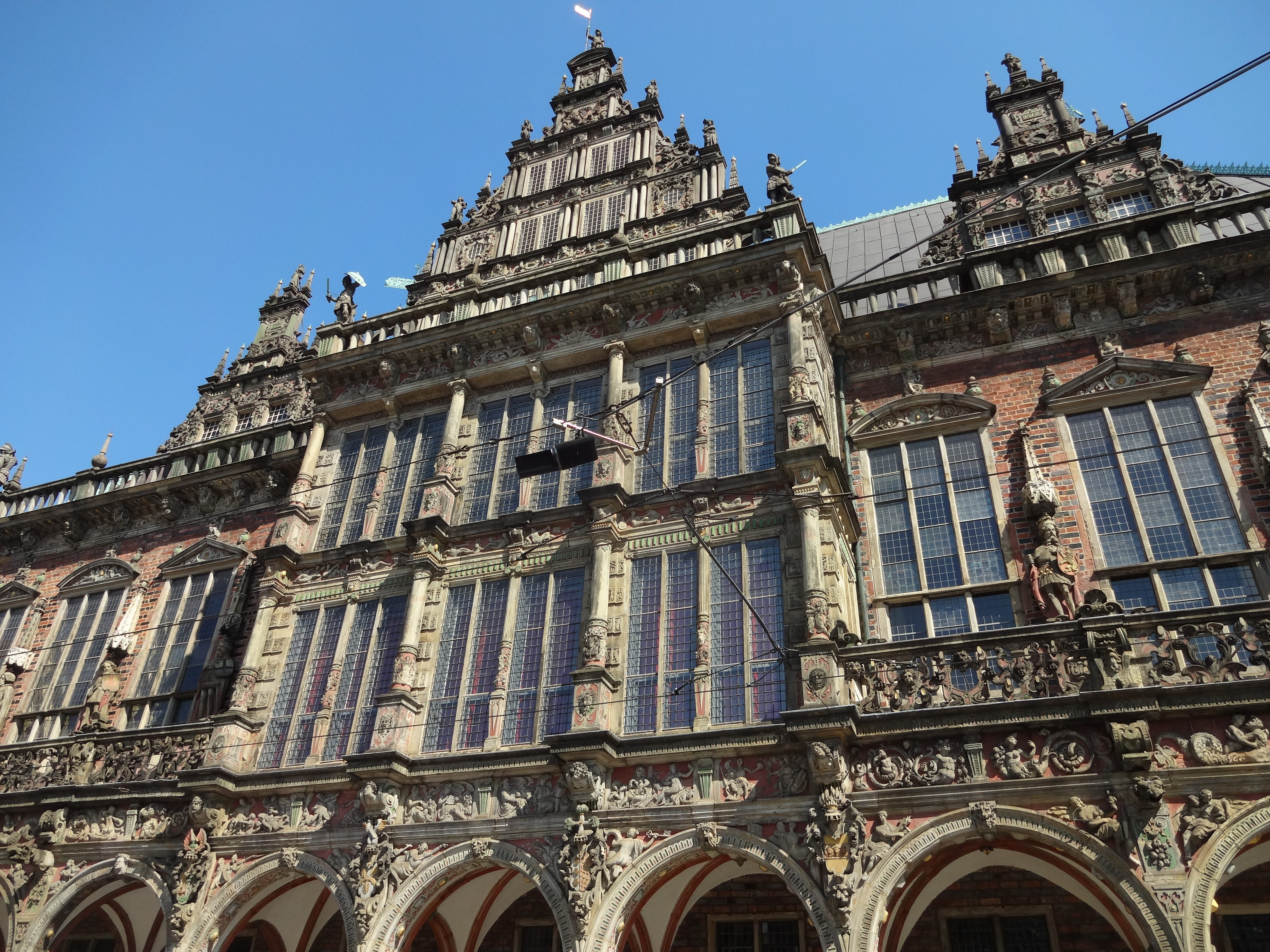 Rathaus in BremenDas abgebildete Objekt ist ein geschütztes Kulturdenkmal in der Freien Hansestadt Bremen, mit der Nr. 0066,T001 beim Landesamt für Denkmalpflege registriert.